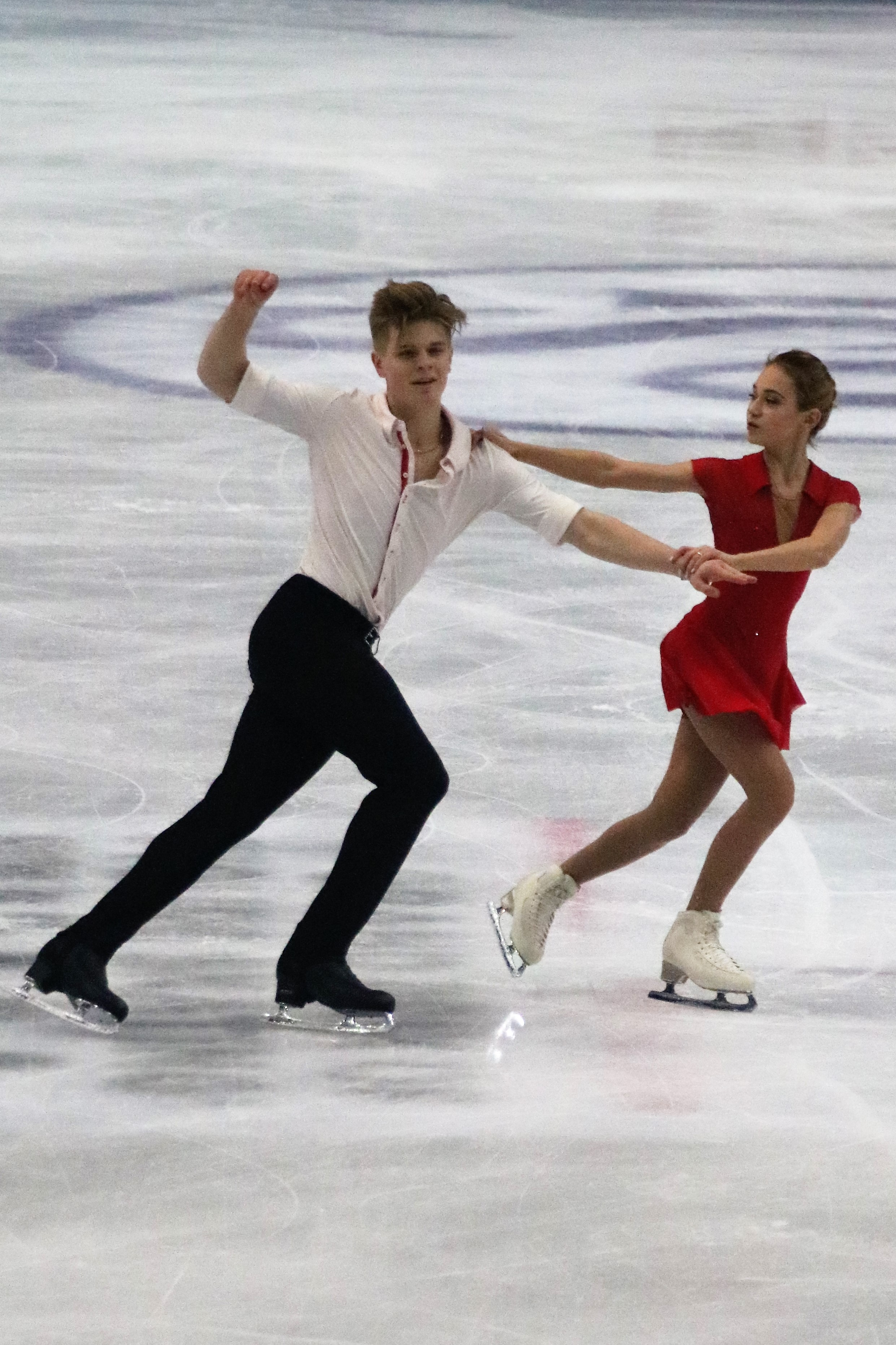 Алина Пепелева / Роман Плешков (Россия) на финале юниорского Гран-при 2019-2020